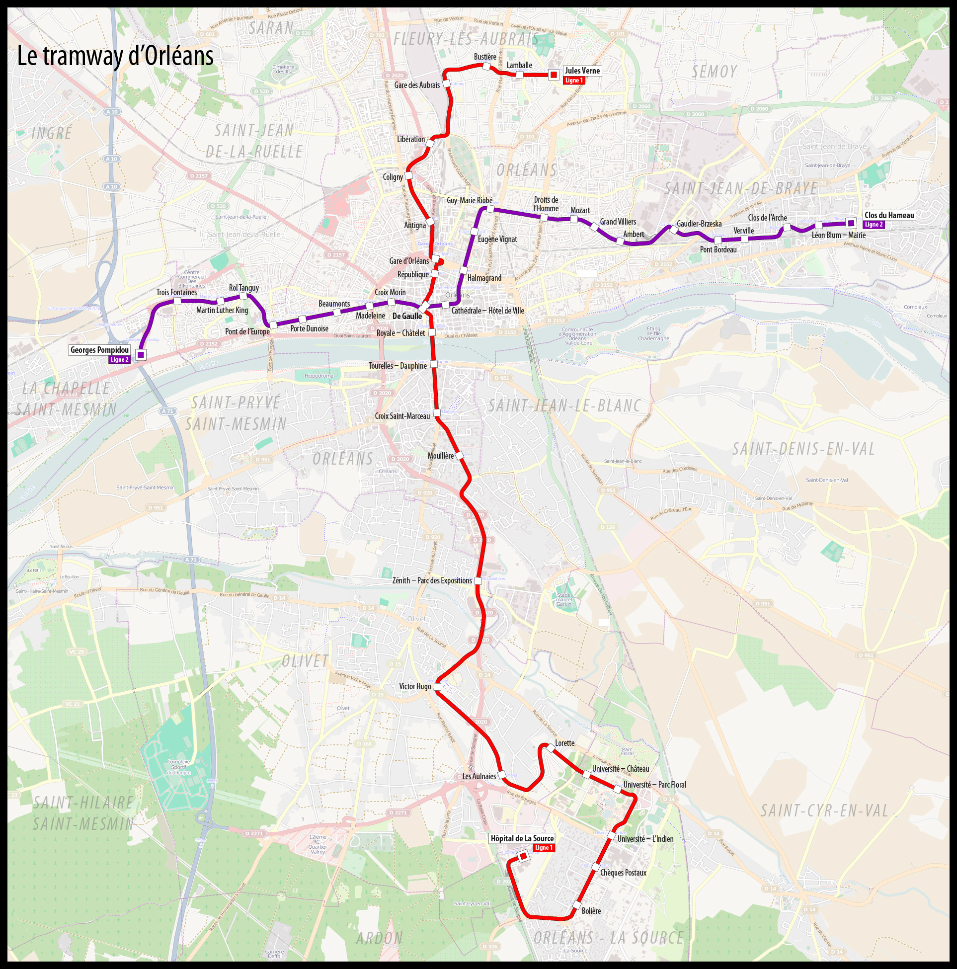 Карта трамвај Орлеанс